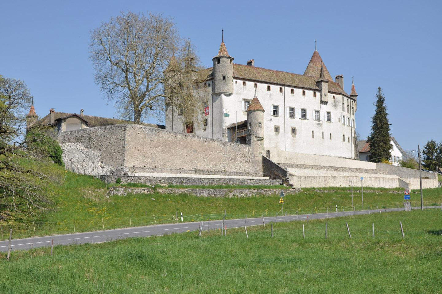 Chäteau d'Oron à Oron-le-Châtel en Suisse prise en avril 2011.